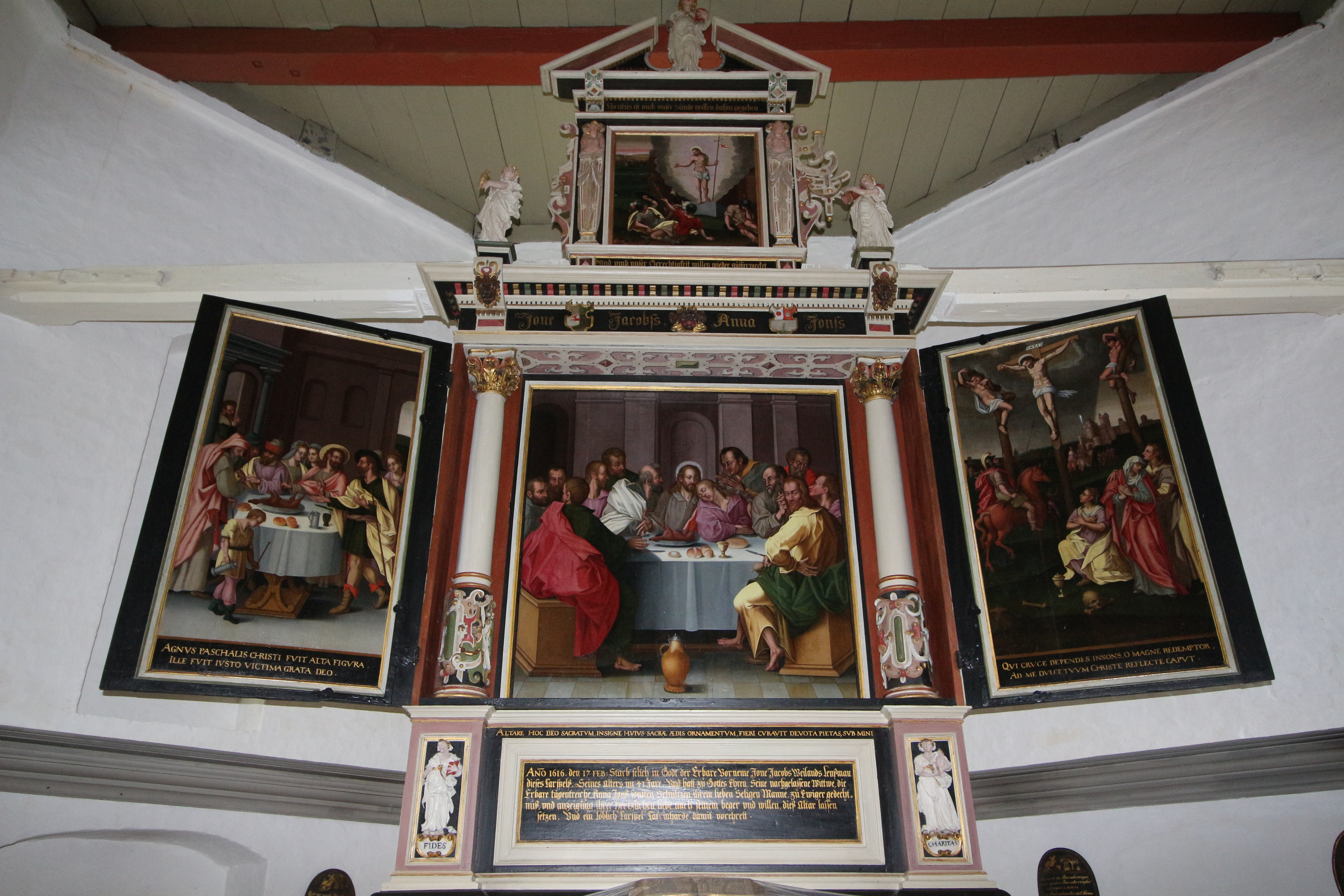 Altar der Katharinenkirche in Katharinenheerd